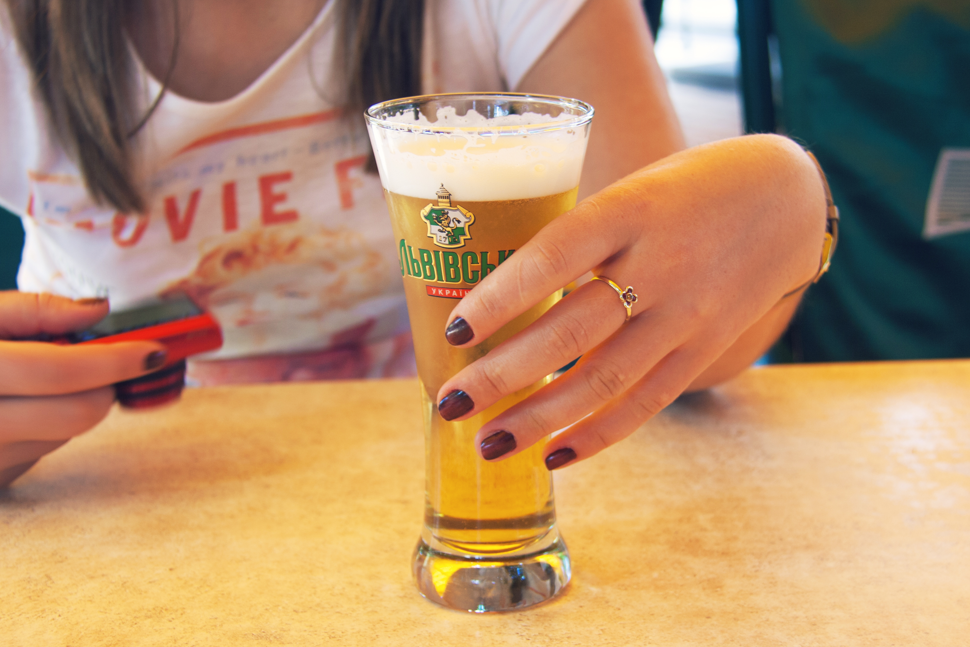 Kiev, Ucrania